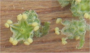 (Melganzenvoet bloemen) Chenopodium album